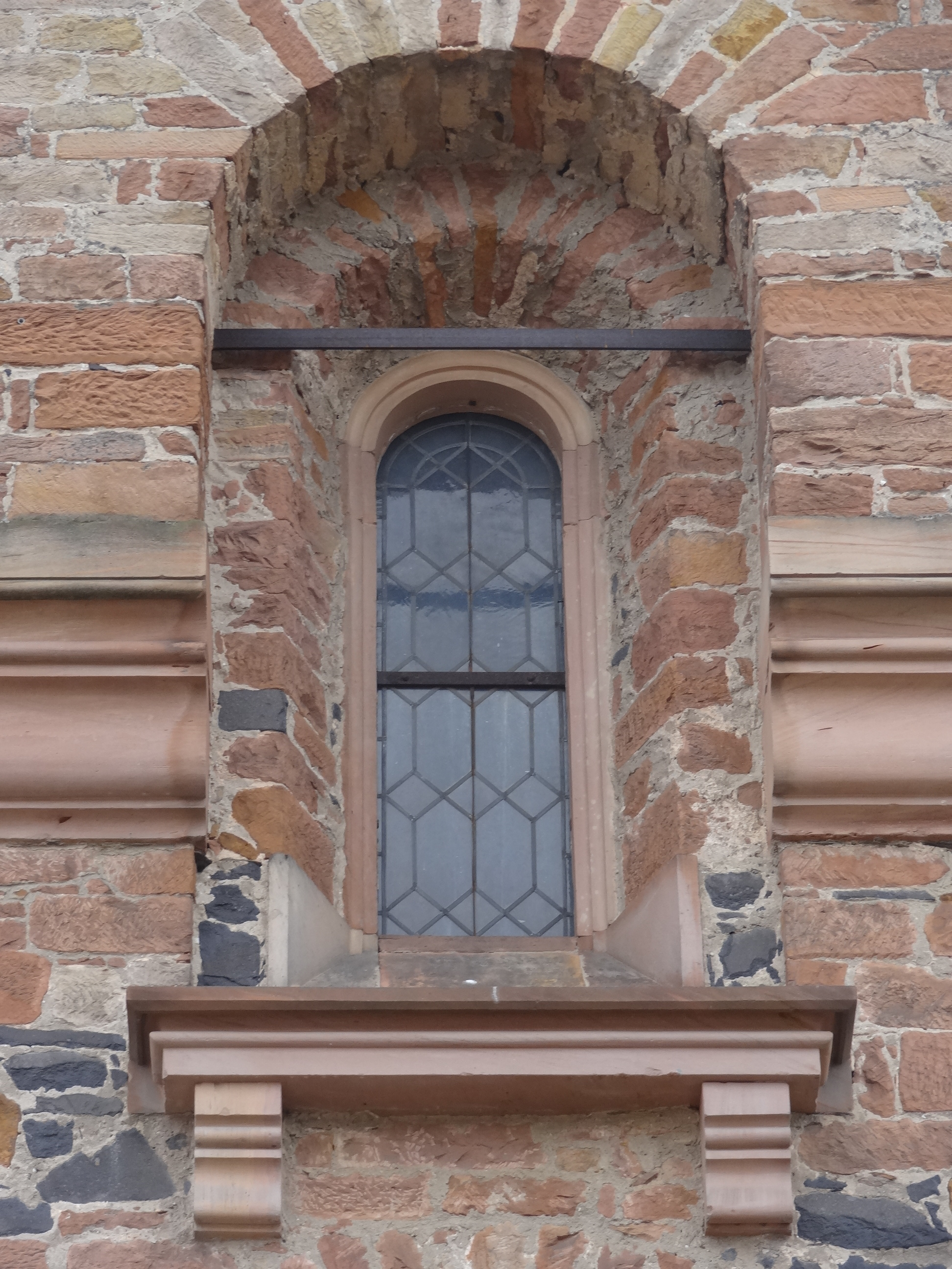 Evangelische Kirche Borsdorf